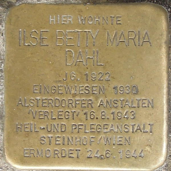 Stolperstein Ilse Betty Maria Dahl